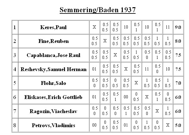 Chess_Semmering_Baden_1937